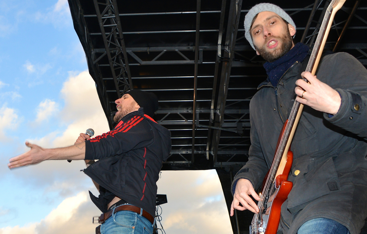 Demonstration för mångfald, mot rasism och fascism anordnad av Linje 17 i Kärrtorp 22 december 2013.